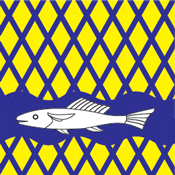 Flag of Alajõe vald, Estonia